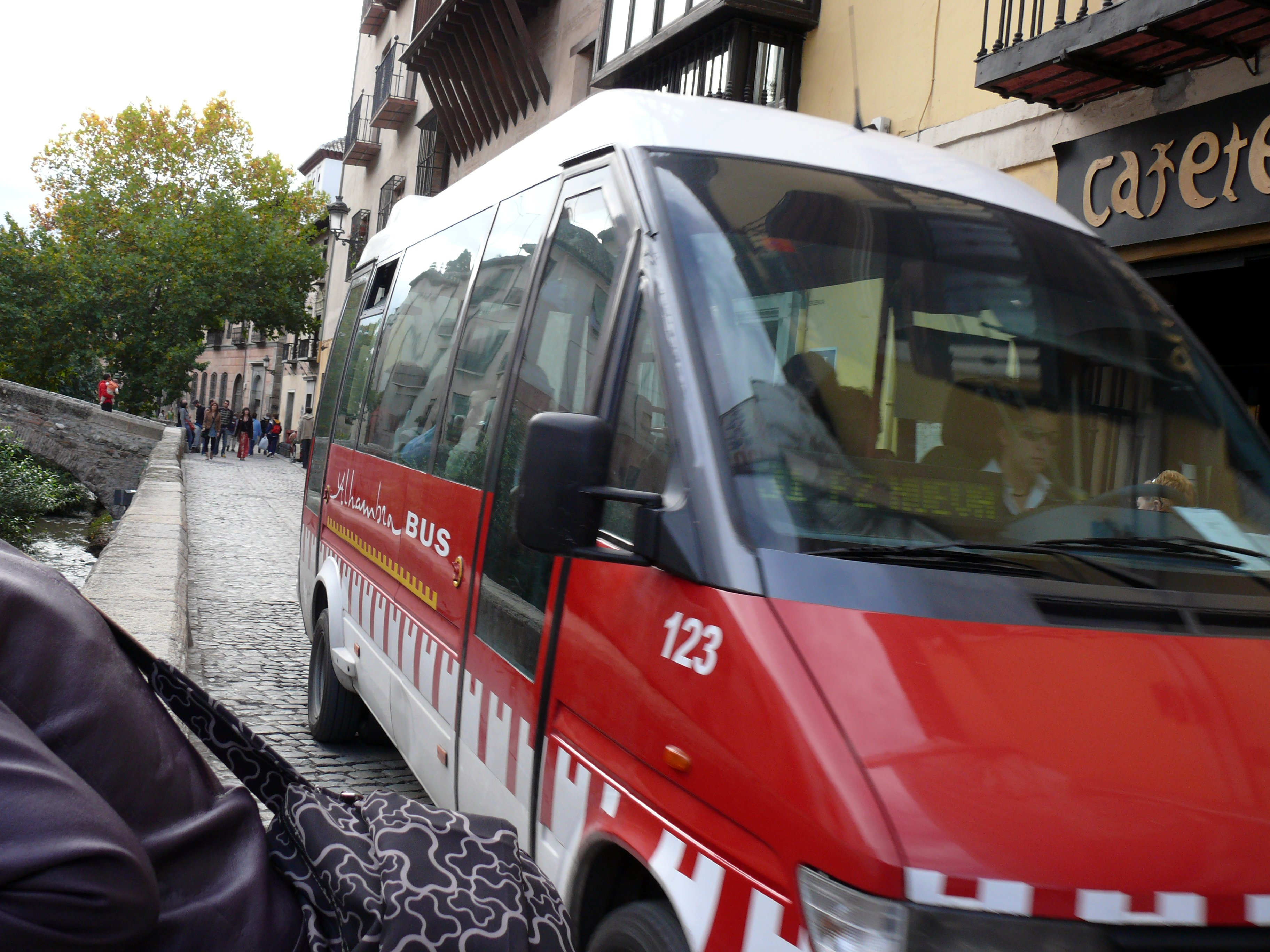 Autobús de la empresa Alhambra Bus, filial de Transportes Rober, concesionaria del transporte público en Granada (España).